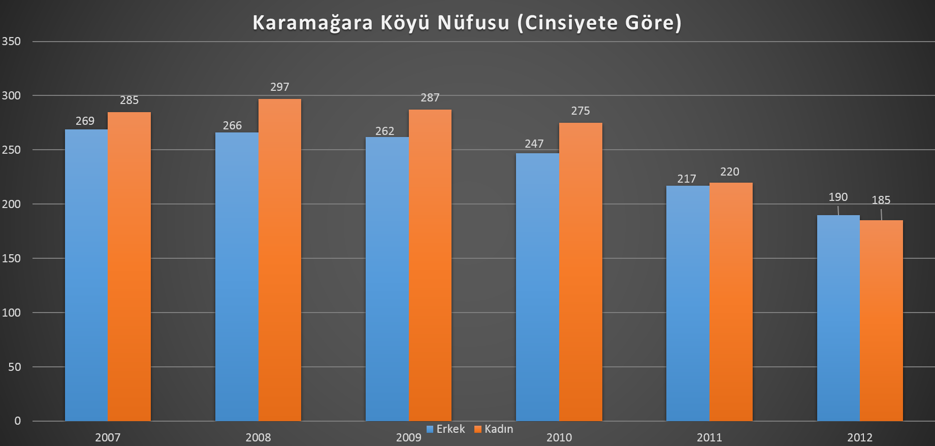 Karamağara Köyü (Elbistan-K. Maraş) Nüfus İstatistikleri TÜİK Verilerine dayanılarak hazırlanılmıştır. [1]